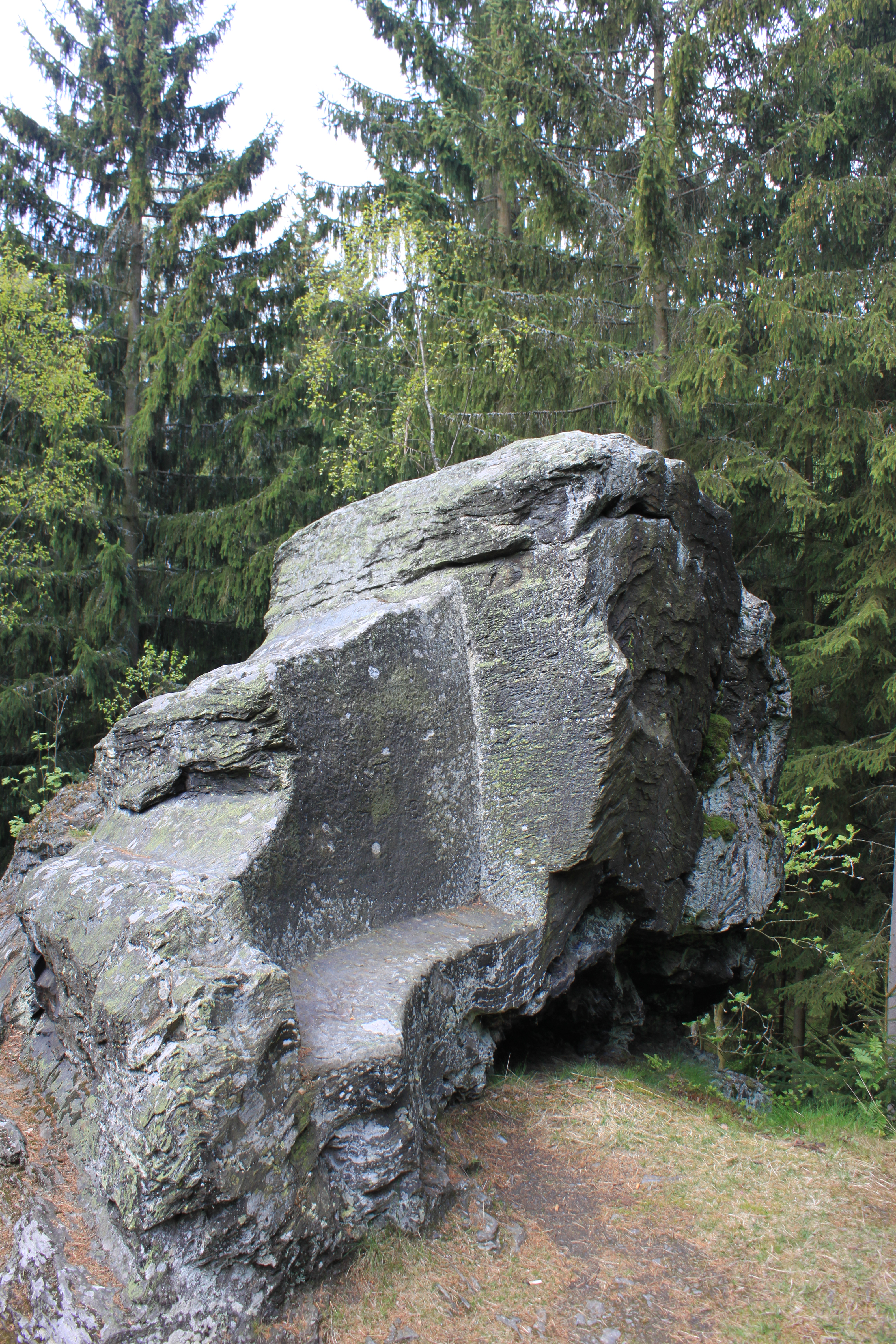 ein natürlicher Phyllitschiefer-Felsen auf einer 686 m großen Anhöhe südöstlich des Dorfes Kleinwendern, Gemeinde Bad Alexandersbad im Landkreis Wunsiedel im Fichtelgebirge (Oberfranken), Südseite